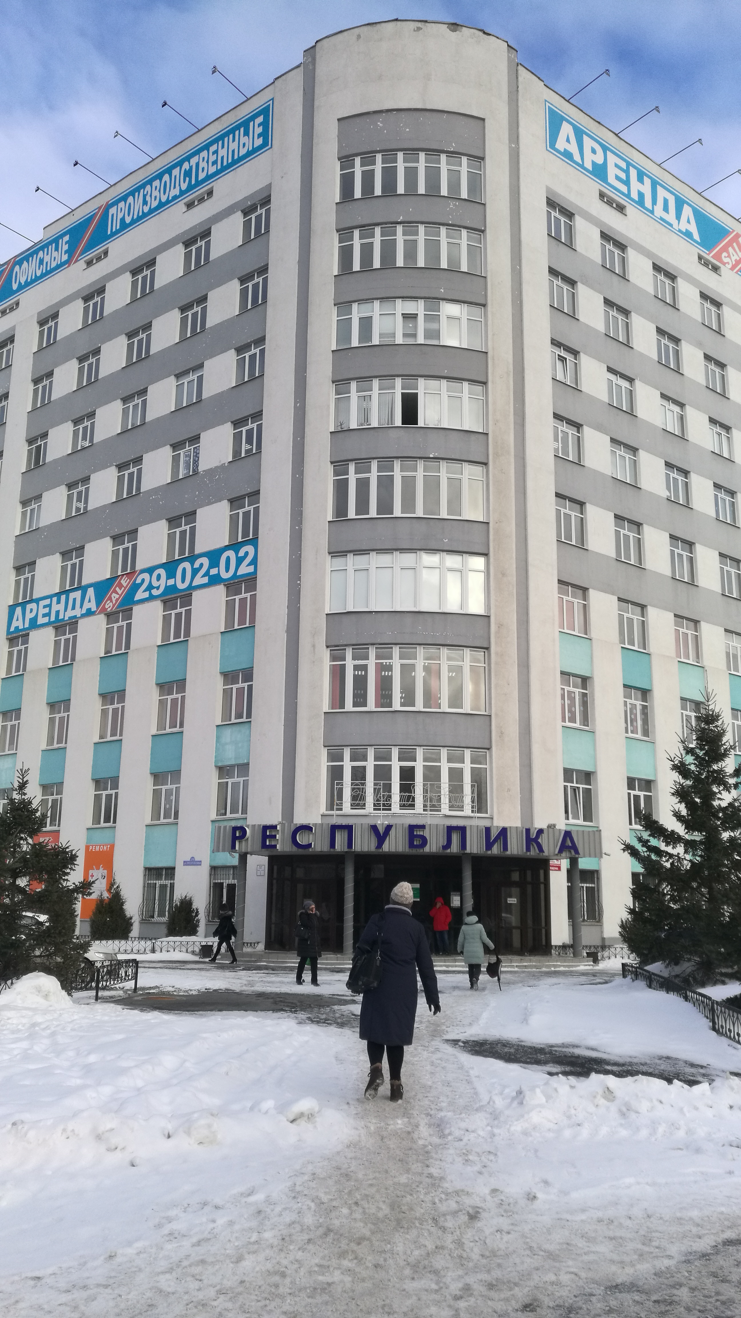 Oficejaro "Respubliko". Tjumeno, Rusio.